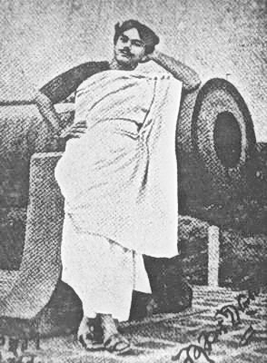 Kazi Nazrul Islam